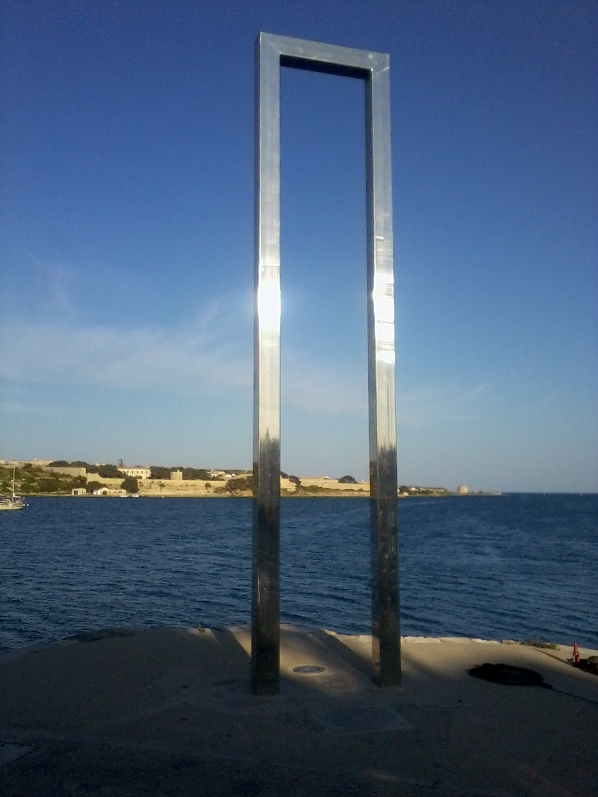 Monumento "la Porta d'Eos"